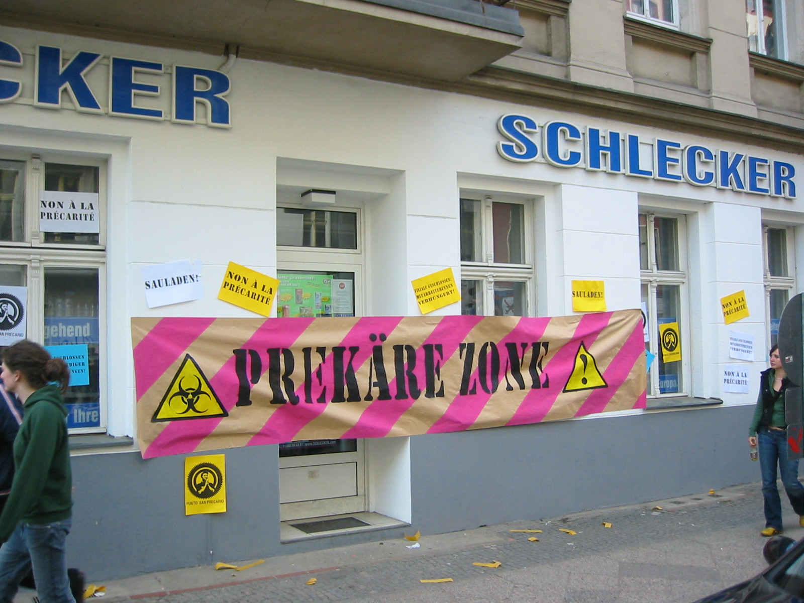 Schlecker-Filiale in Berlin-Kreuzberg während der 1. Mai Demonstration Mayday